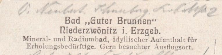 Niederzwönitz: Wahrscheinlich schon im 19. Jahrhundert, wenn nicht schon früher, gab es in Niederzwönitz auf einer Höhe von 600 Metern das Bad Gutenbrunn mit einem Badehaus. Es wurde auch Bad „Guter Brunnen“ genannt und auf Ansichtskarten bis in die Mitte des 20. Jahrhunderts mit „Mineral- und Radiumbad, idyllischer Aufenthalt für Erholungsbedürftige. Gern besuchter Ausflugsort“ beworben.